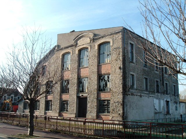 Anciens moulins à poudre de Corbeil-Essonnes (91).